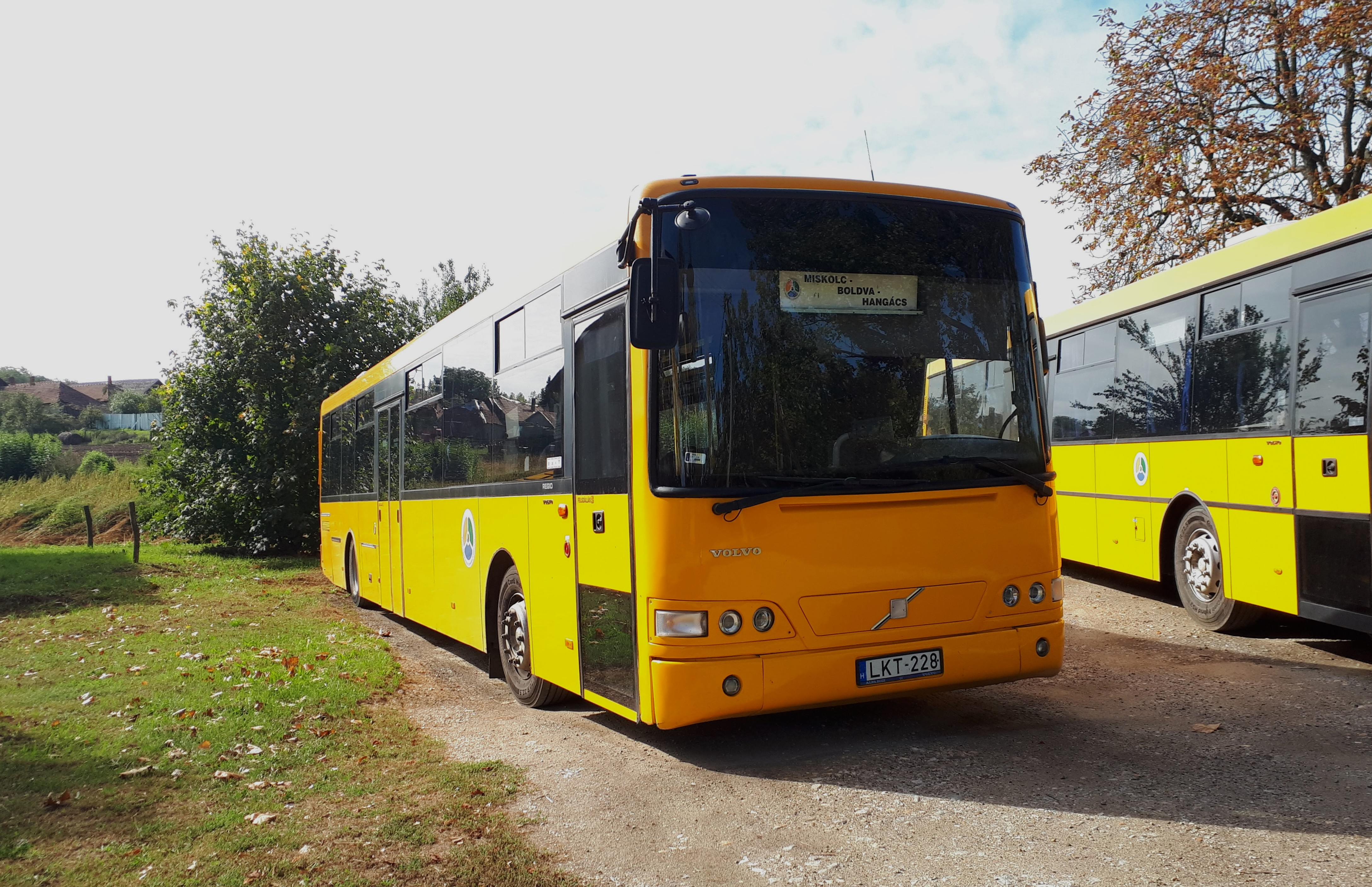 Az ÉMKK LKT-228 rendszámú Volvo Alfa Regio típusú busza Nyomáron, a 3776-os helyközi járaton.